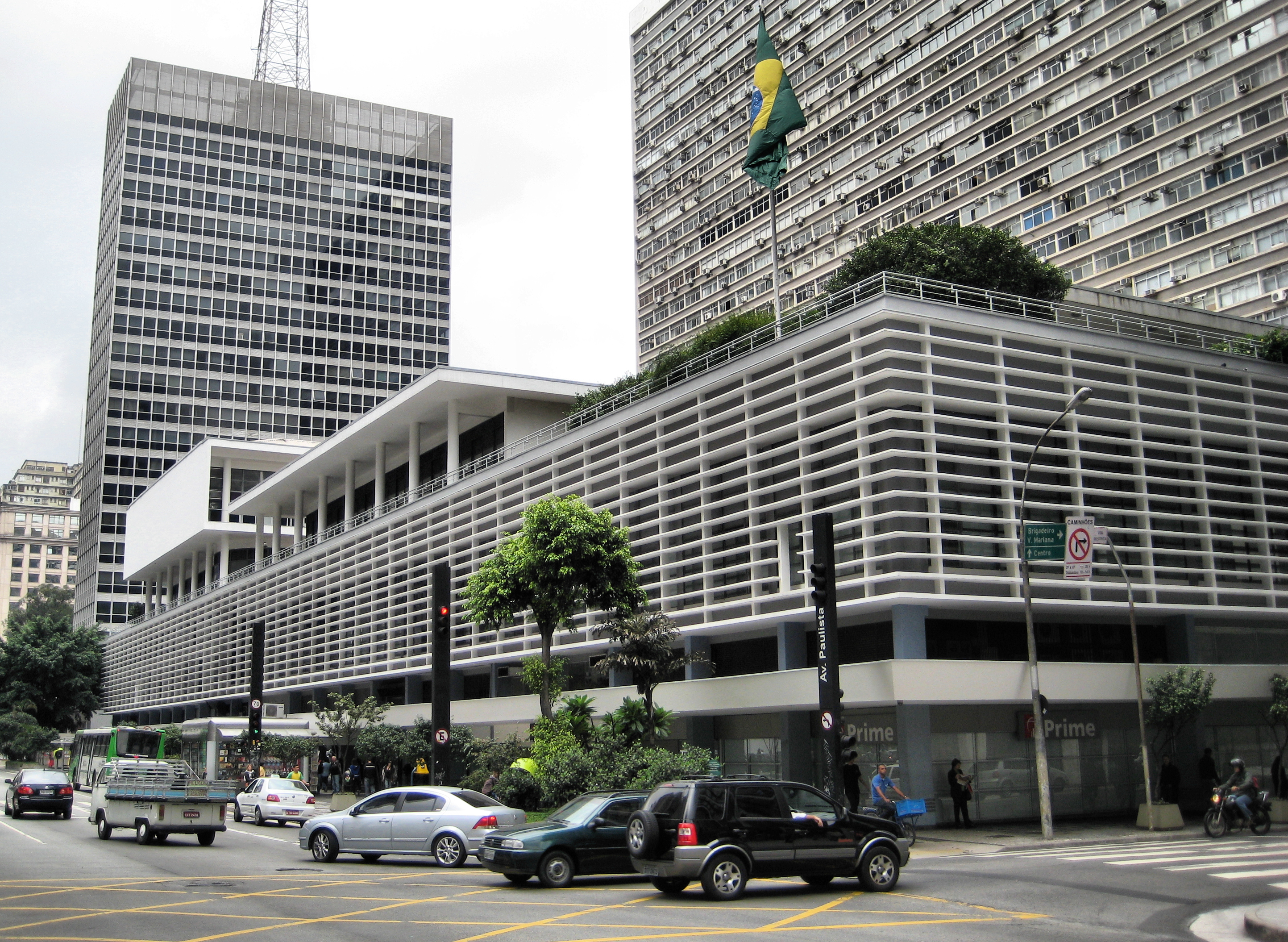 Banco Itau Av Paulista